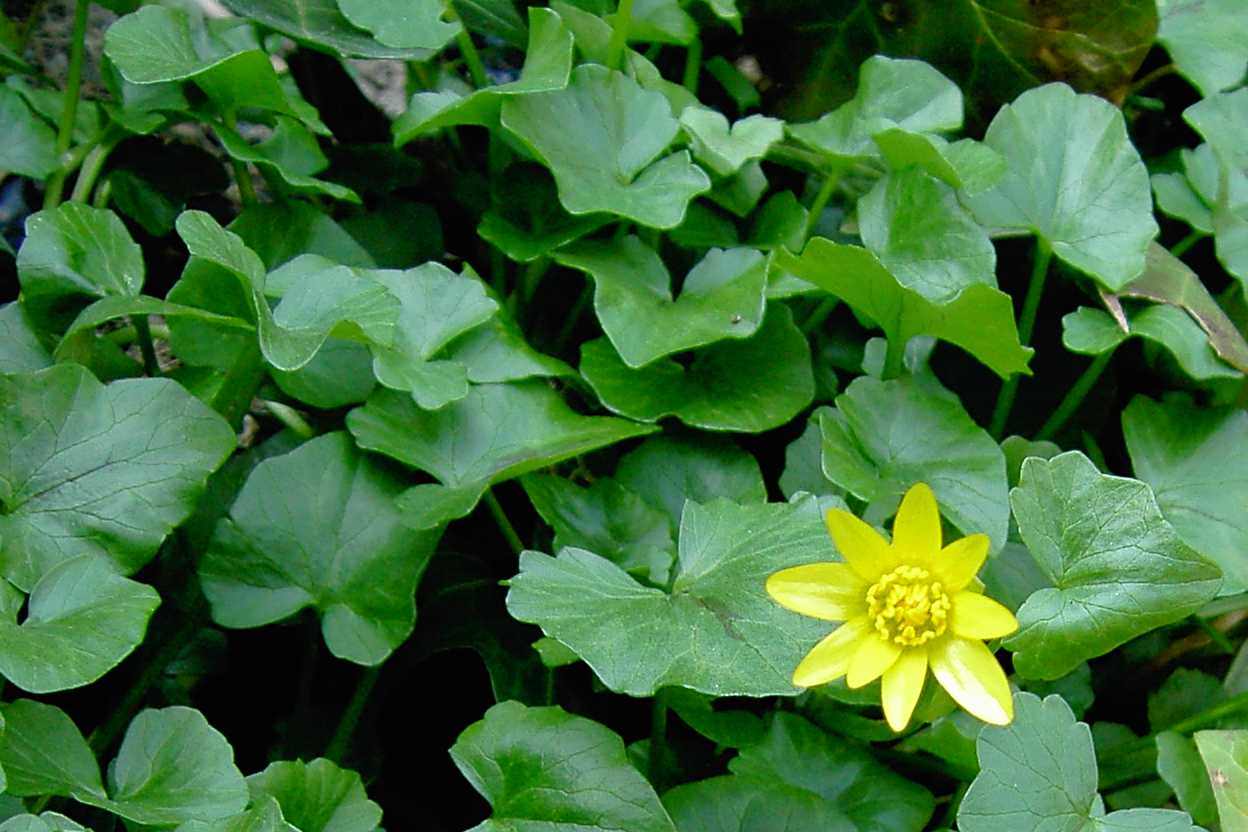 Billede:Vorterod.jpg Uploaded to da: by Bruger:Glenn on 17 April 2004